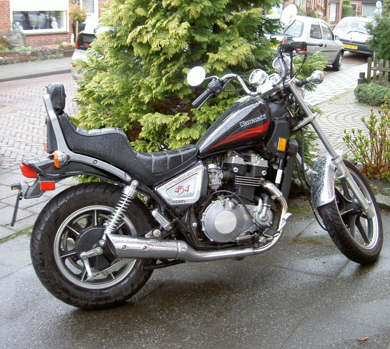 chopper Kawasaki 454LTD